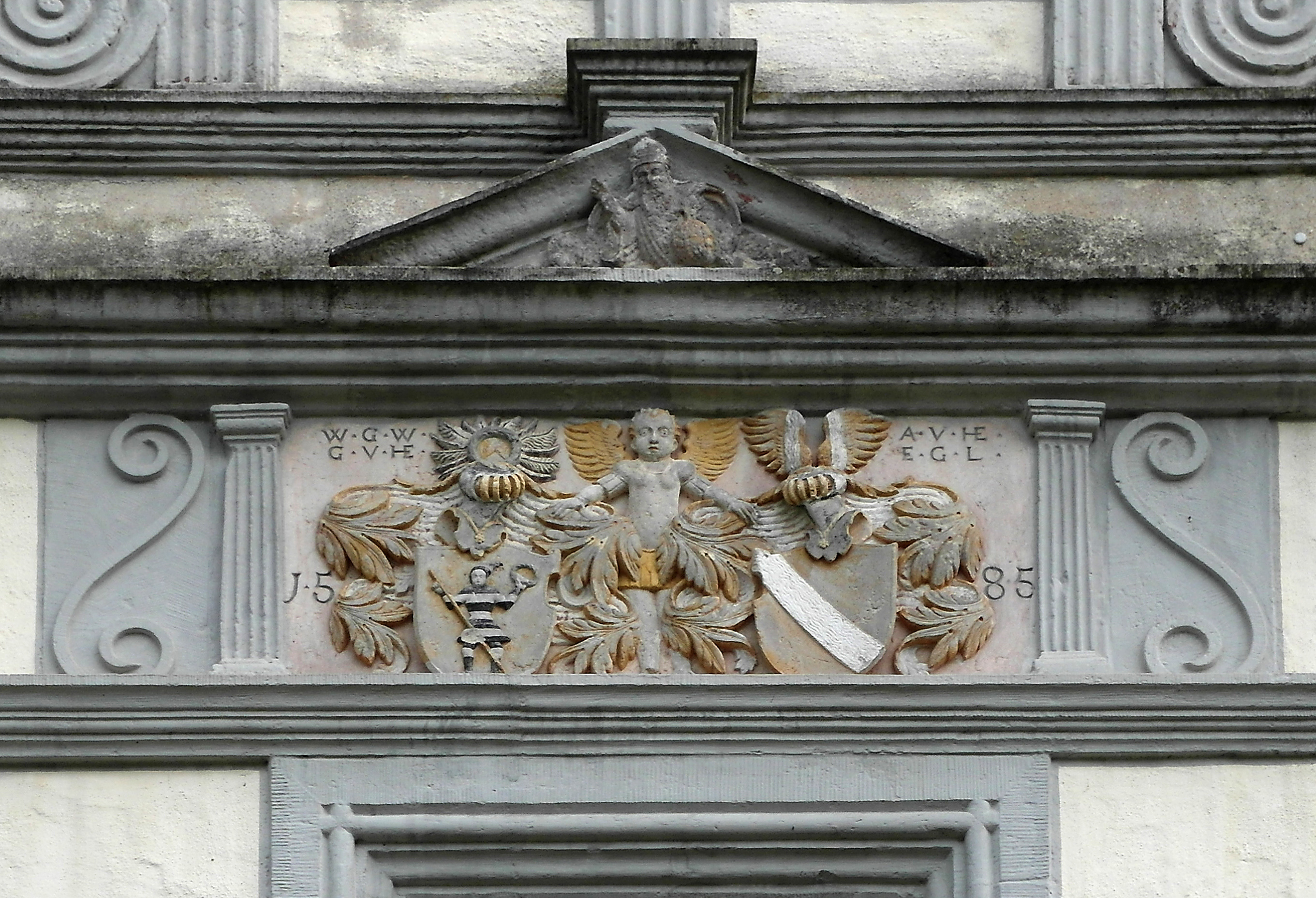 Renaissanceschloss Heynitz. Hofseitiger Erker von 1585 mit den Wappen des Georg von Heynitz und seiner Gattin Anna Lauterbach.